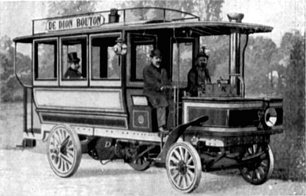 Dampfomnibus. K stehender Röhrenkessel, D Dampfmaschine